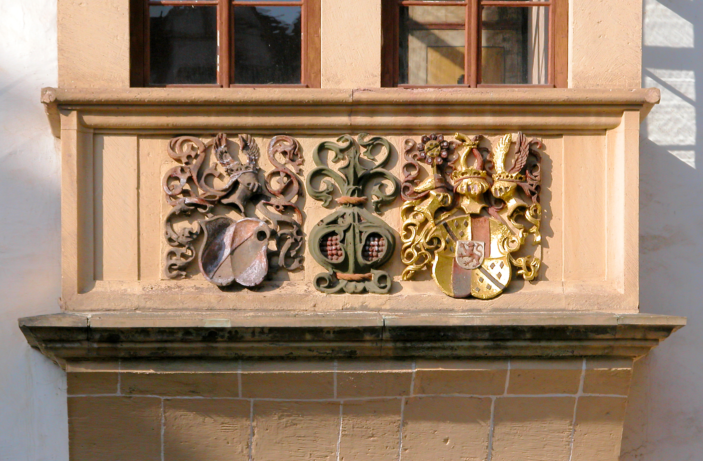 16.10.2007 08371 Glauchau, Schloßstraße 1: Schloß Hinterglauchau. Ostfassade des Nordflügels. Wappenfeld am Renaissanceerker. [DSCN30756.TIF]20071016340DR.JPG(c)Blobelt